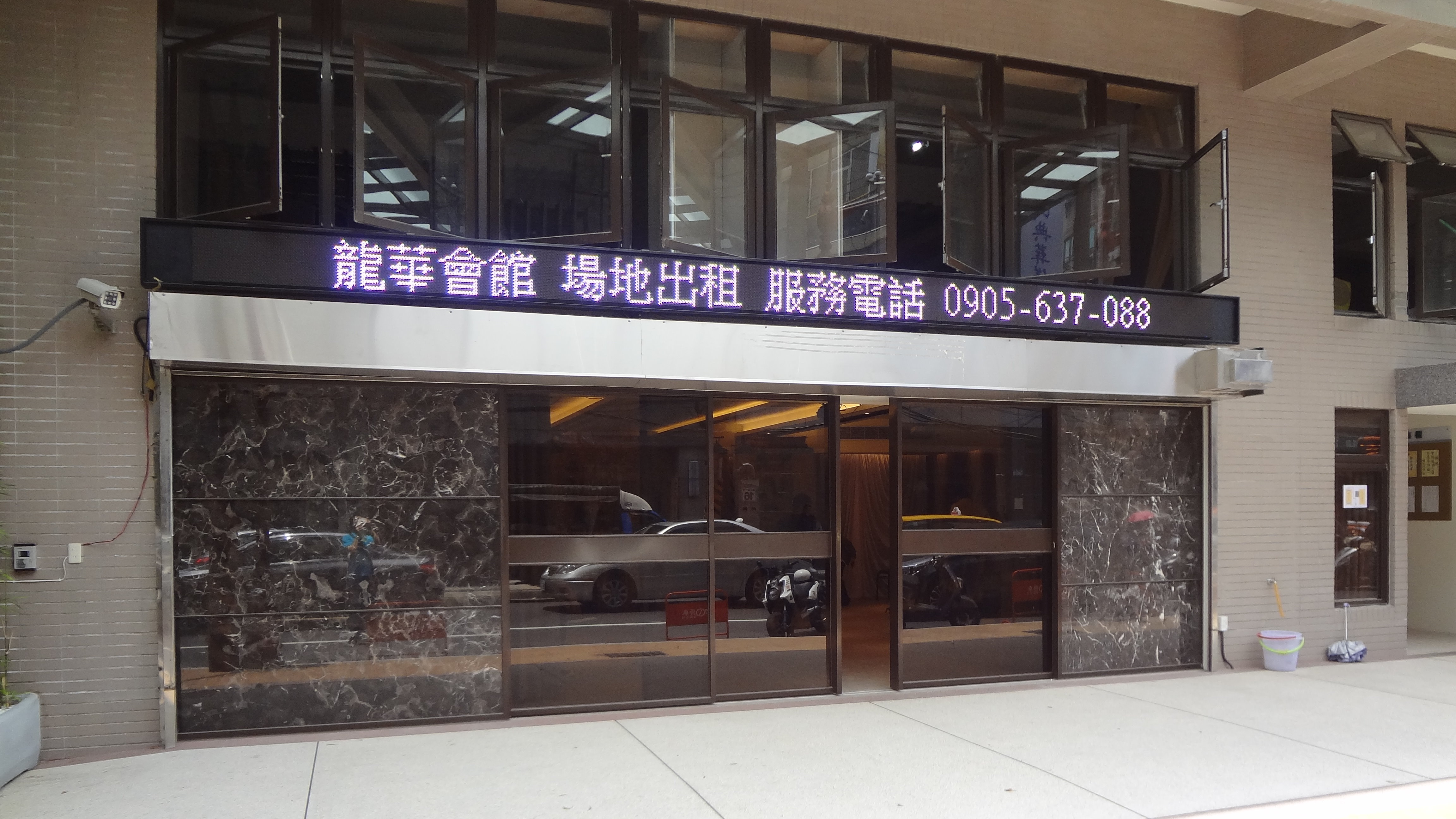 龍華會館，位於新北市板橋區長江路一段7號1樓，最右側玻璃窗張貼豬哥亮靈堂地圖。